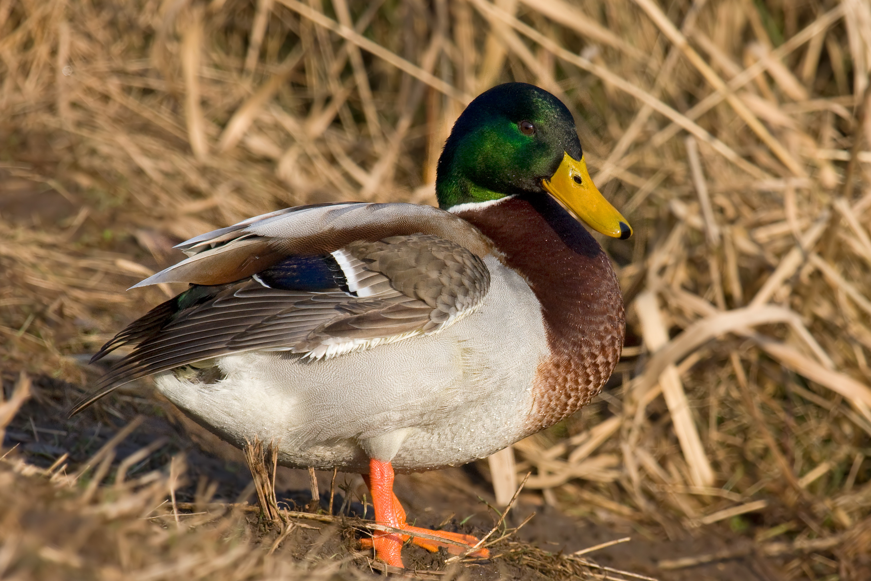 Anas platyrhynchos male (Lahn/Germany)